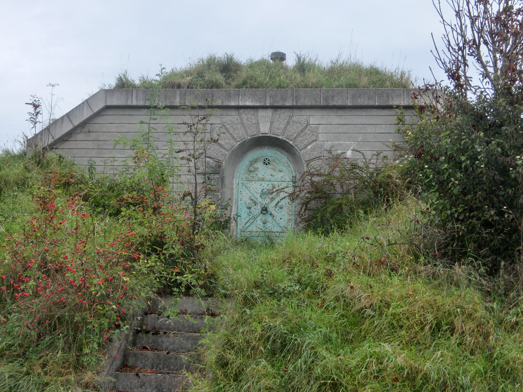 Deutschland - Baden-Württemberg - Landkreis Konstanz - Mühlingen - Gallmannsweil: Hochbehälter an der Straße 'Waldgaß'